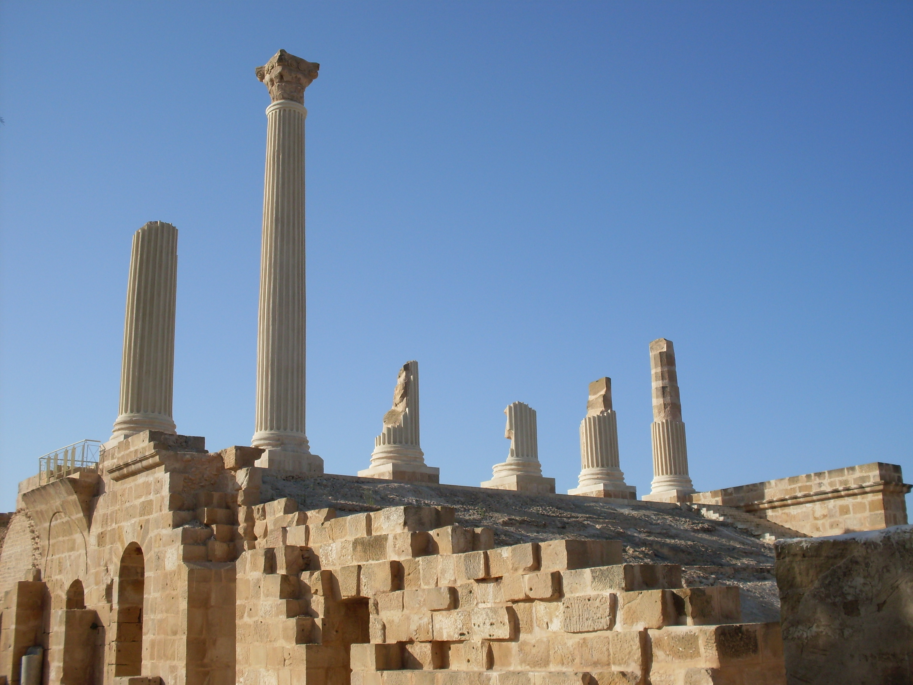 Oudhna Uthina Capitole